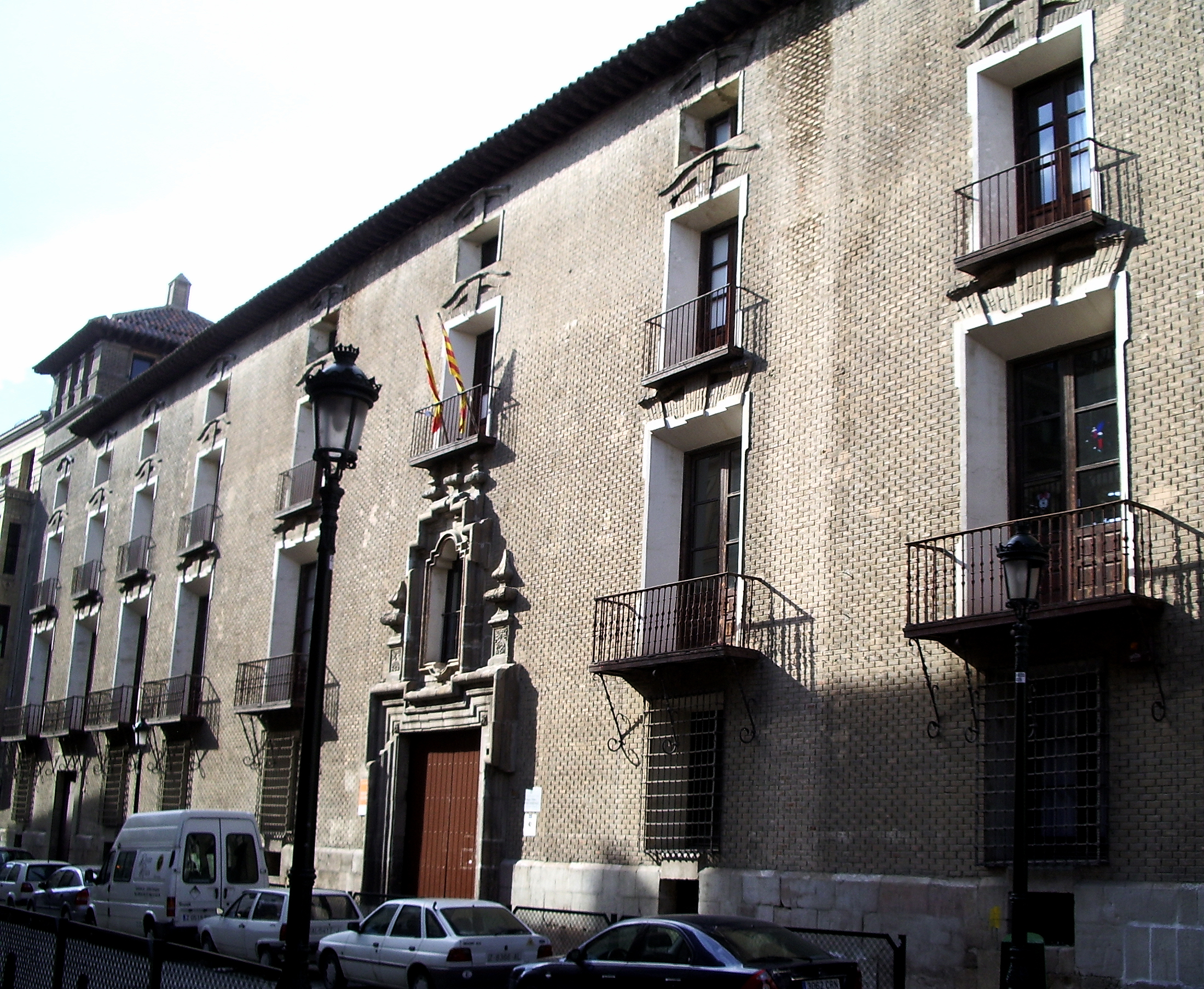 Palacio de Villahermosa (Zaragoza, España)